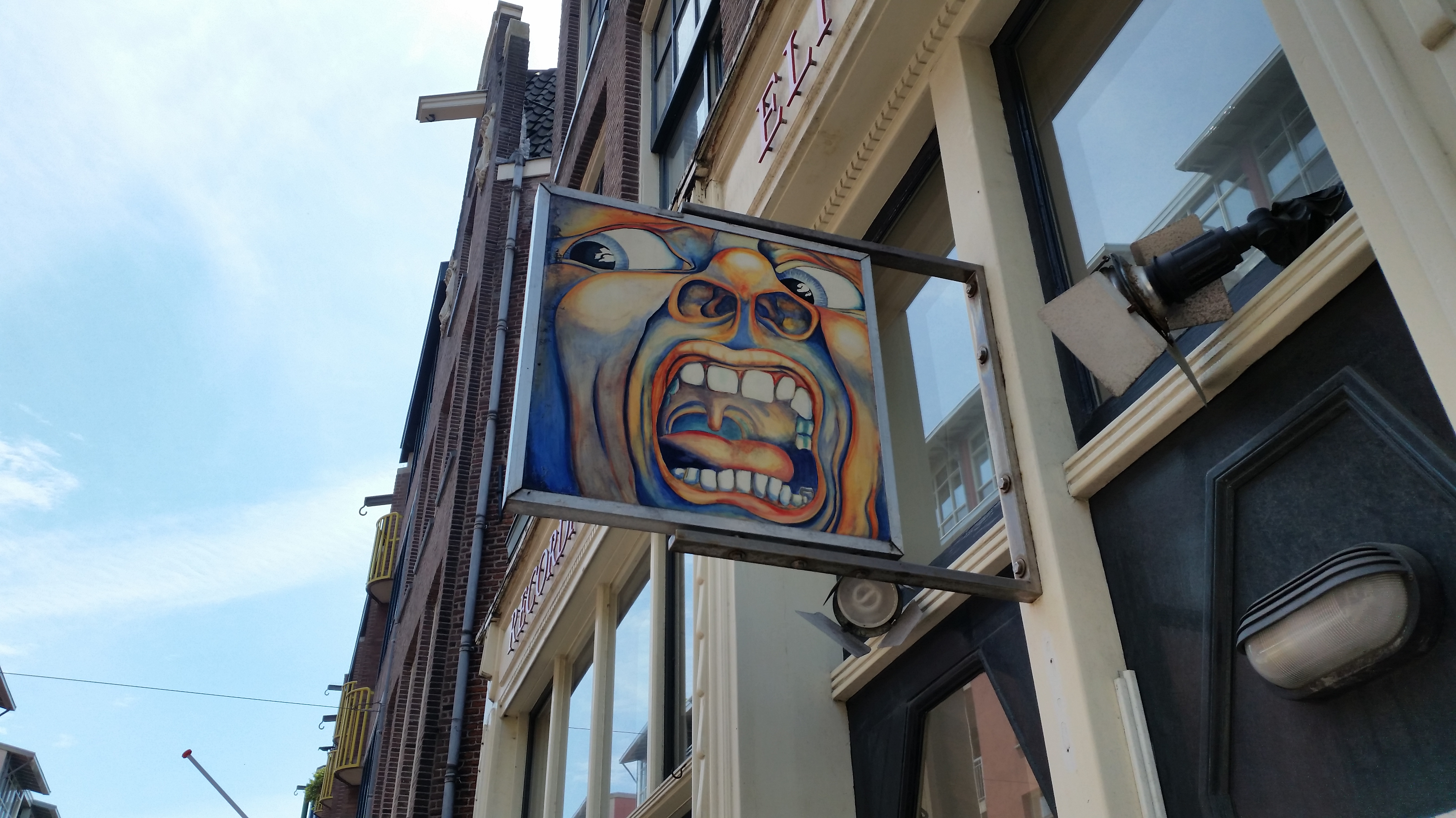 Gaper aan een platenzaak in de Sint Antoniebreestraat, Amsterdam, geïnspireerd op de platenhoes van "In the court of the crimson king"